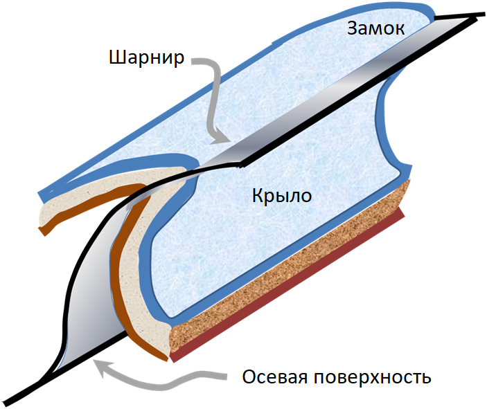 Диаграмма складки в геологии